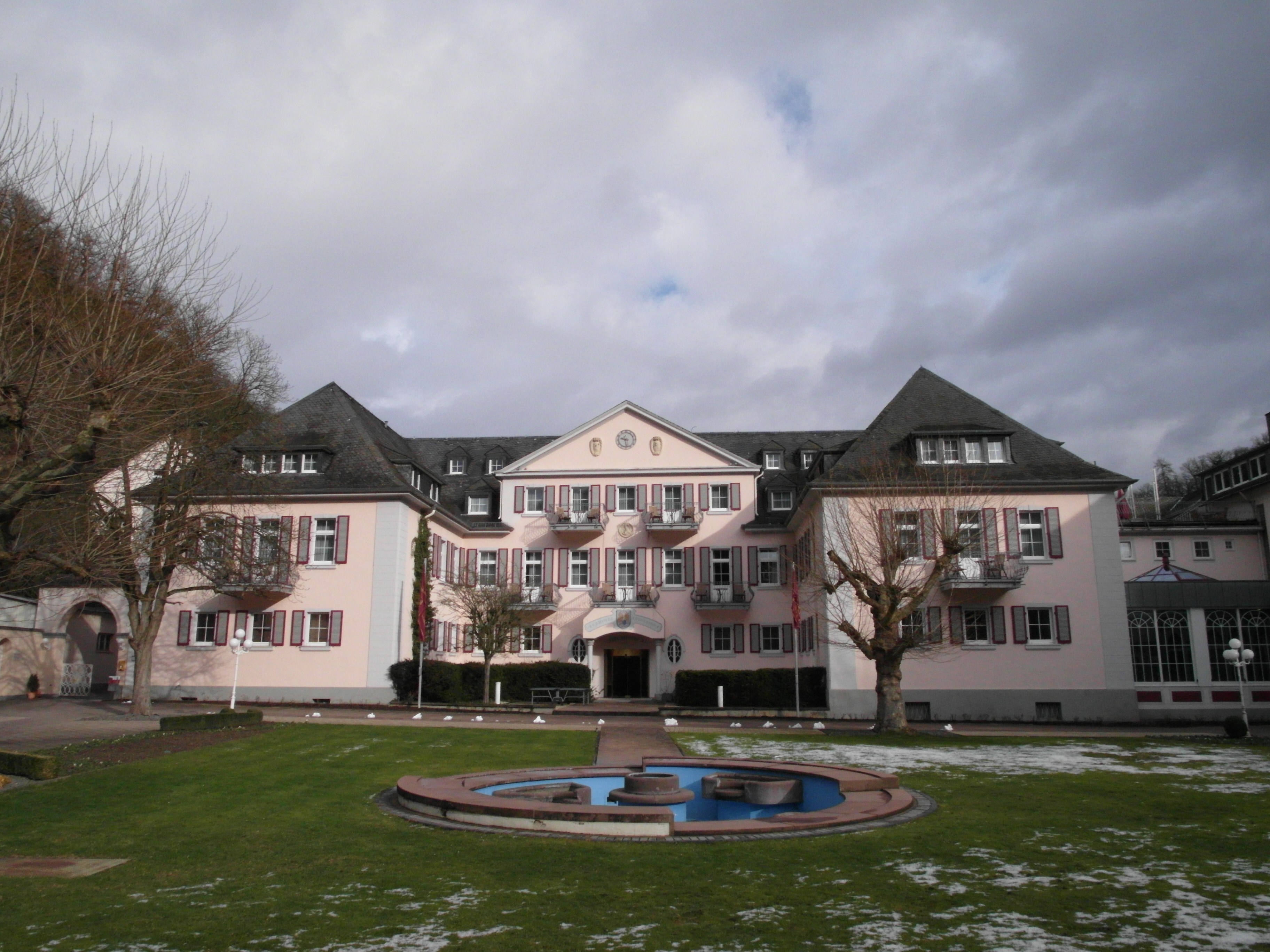 Bad Bertrich, Kurfürstenstraße 36: Kurmittelhaus